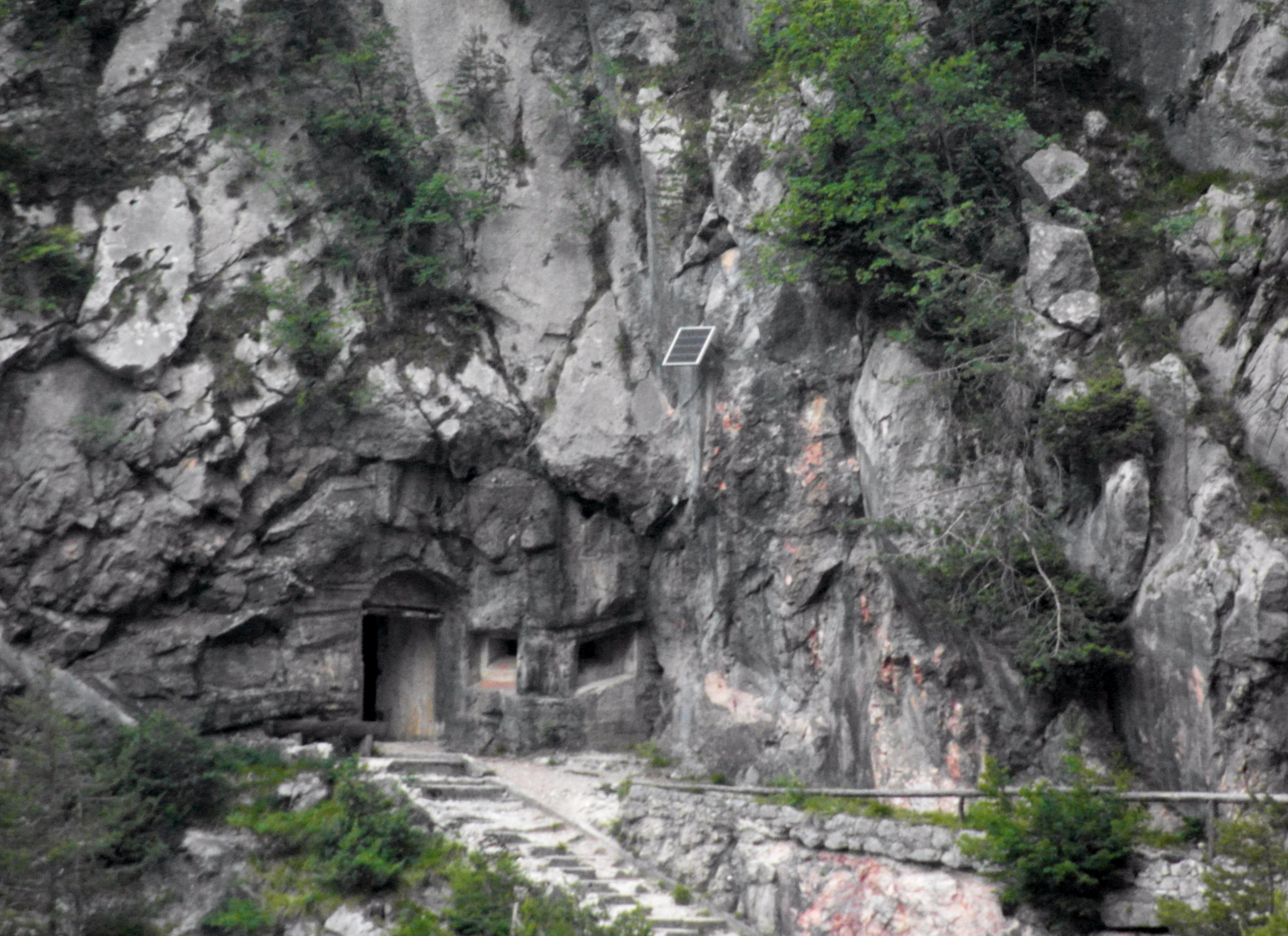 Opera 9 bis Cima Gogna